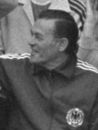 Collectie / Archief : Fotocollectie Anefo Reportage / Serie : [ onbekend ] Beschrijving : Finale wereldkampioenschap voetbal 1974 in Munchen, West Duitsland tegen Nederland 2-1; Duitse elftal met wereldbeker Datum : 7 juli 1974 Locatie : München, Nederland, West-Duitsland Trefwoorden : elftallen, finales, sport, voetbal, wereldkampioenschappen Fotograaf : Verhoeff, Bert / Anefo Auteursrechthebbende : Nationaal Archief Materiaalsoort : Negatief (zwart/wit) Nummer archiefinventaris : bekijk toegang 2.24.01.05 Bestanddeelnummer : 927-3097